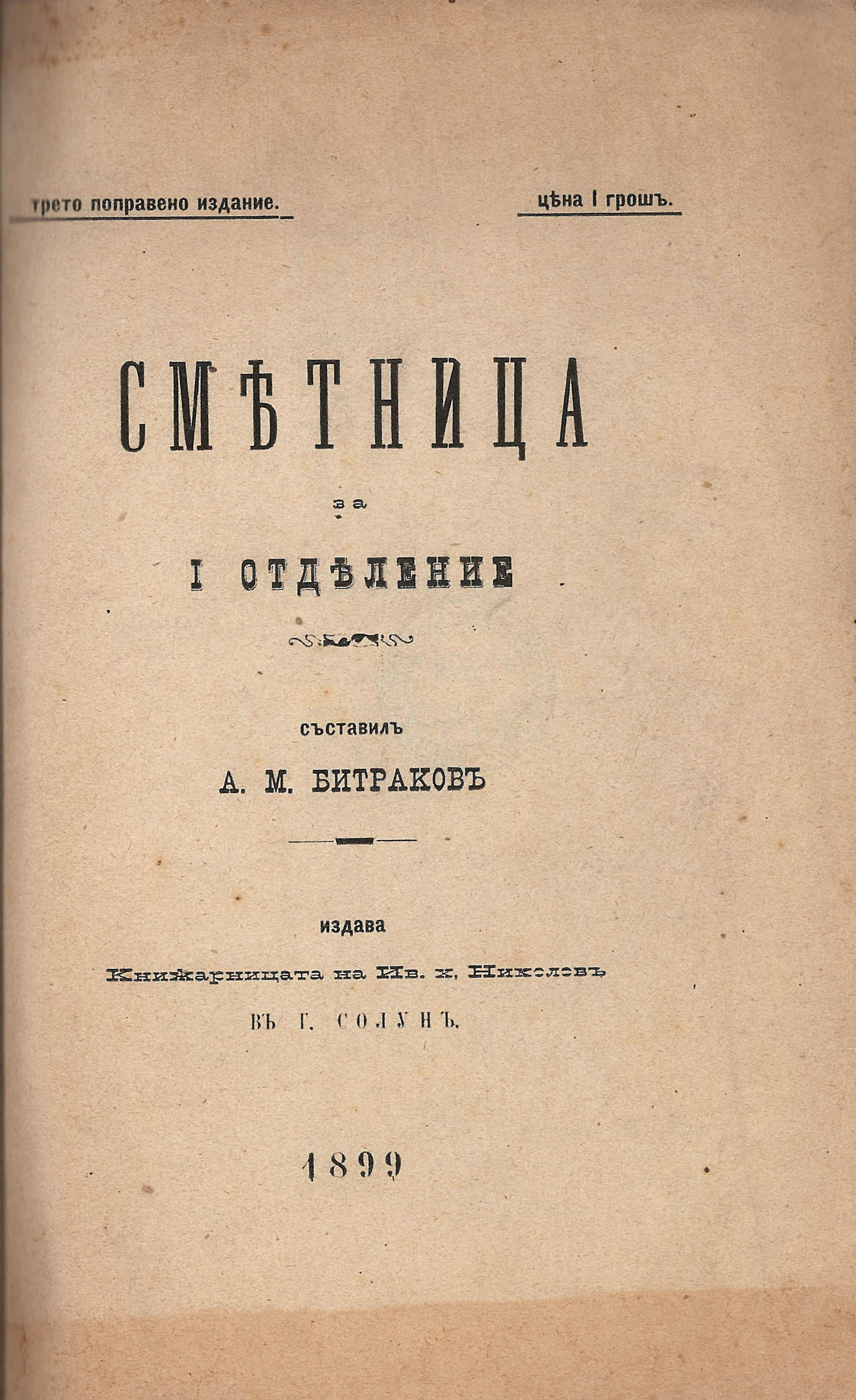 Сметница за Първо отделение, издадена в Солун от книжарницата на Ив. х. Николов